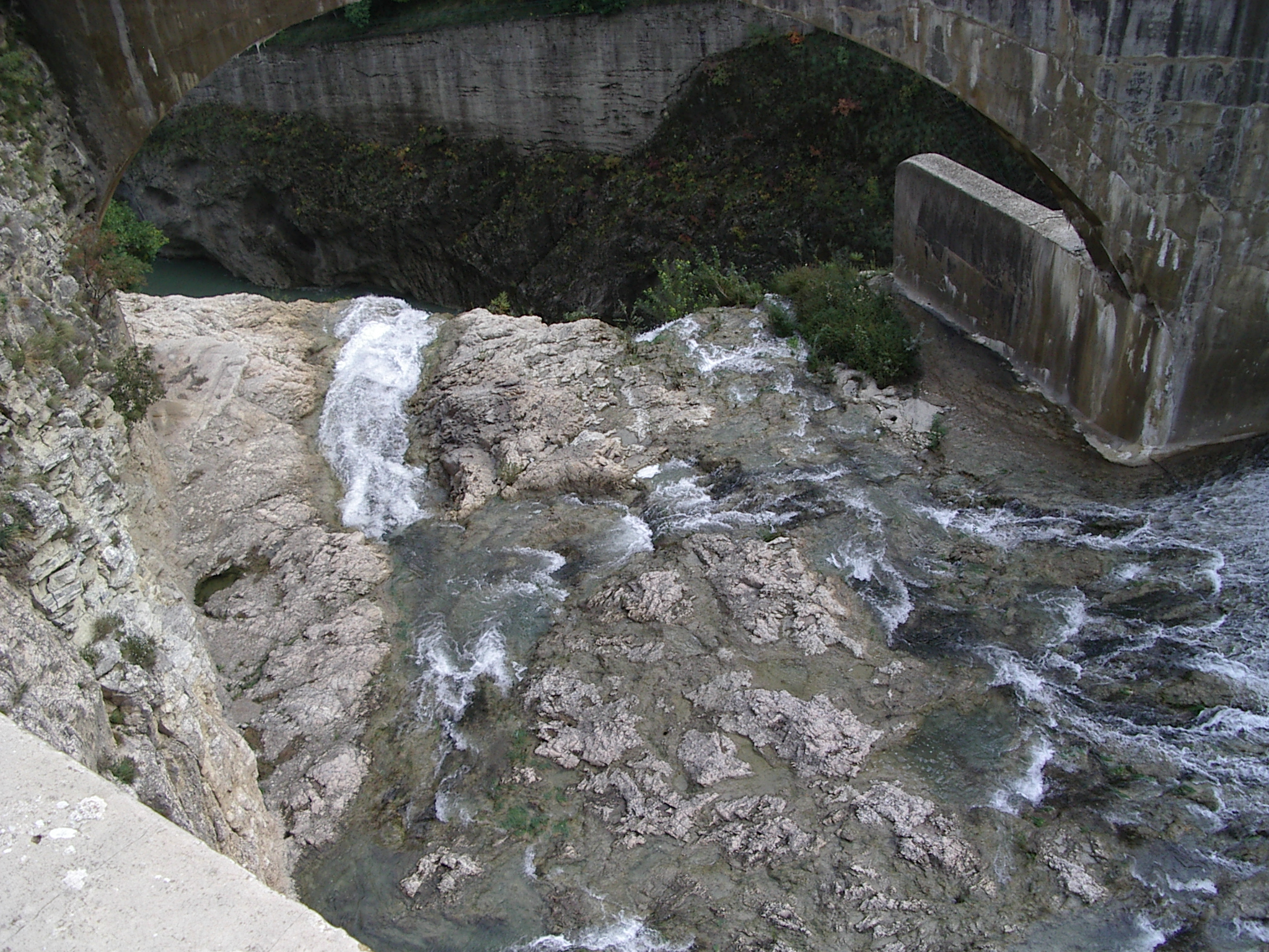 Gola del Furlo Province de Pesaro Urbino Marche Italie